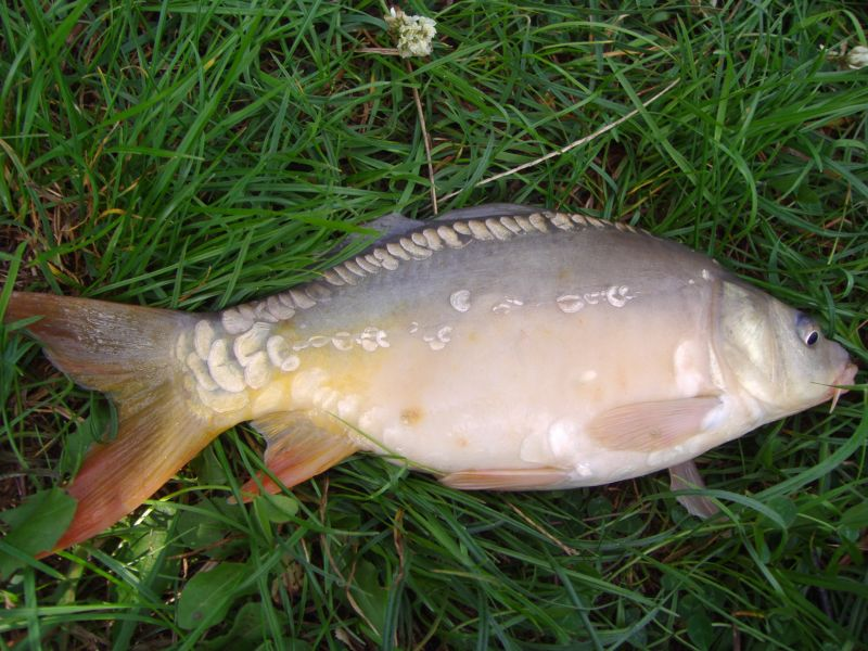 Lustrzeń (Karp Królewski) - odmiana hodowlana